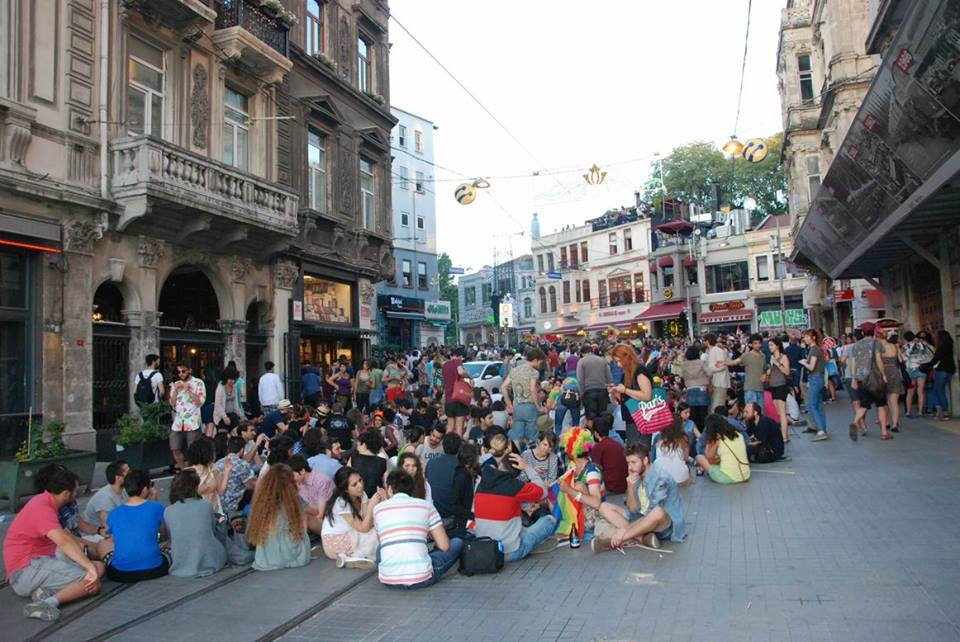 XXII. İstanbul Onur Haftası etkinlikleri kapsamında geleneksel olarak yapılan İstanbul Onur Yürüyüşü'nden görünüm, 2014.